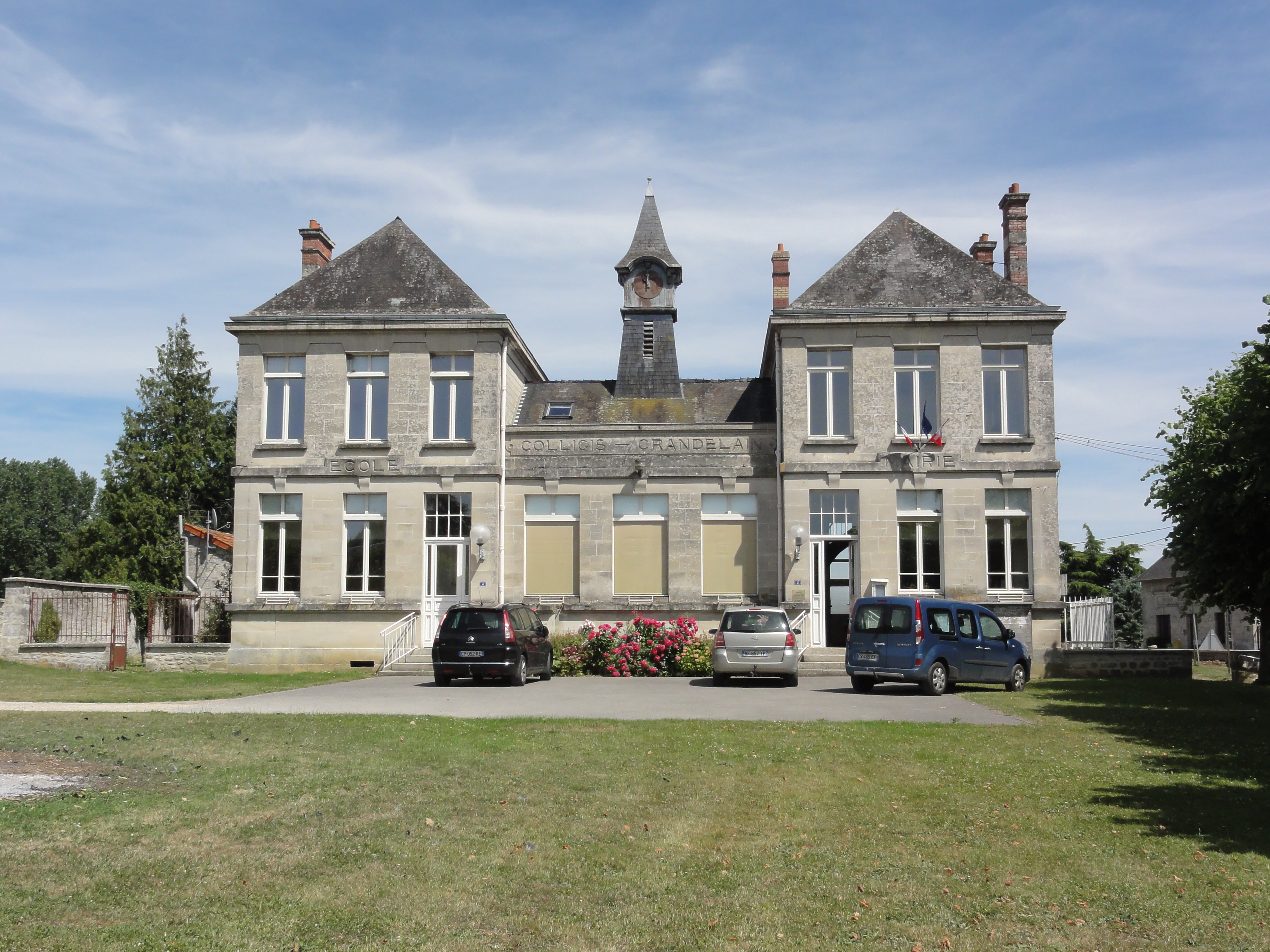 Colligis-Crandelain (Aisne) mairie à Colligis